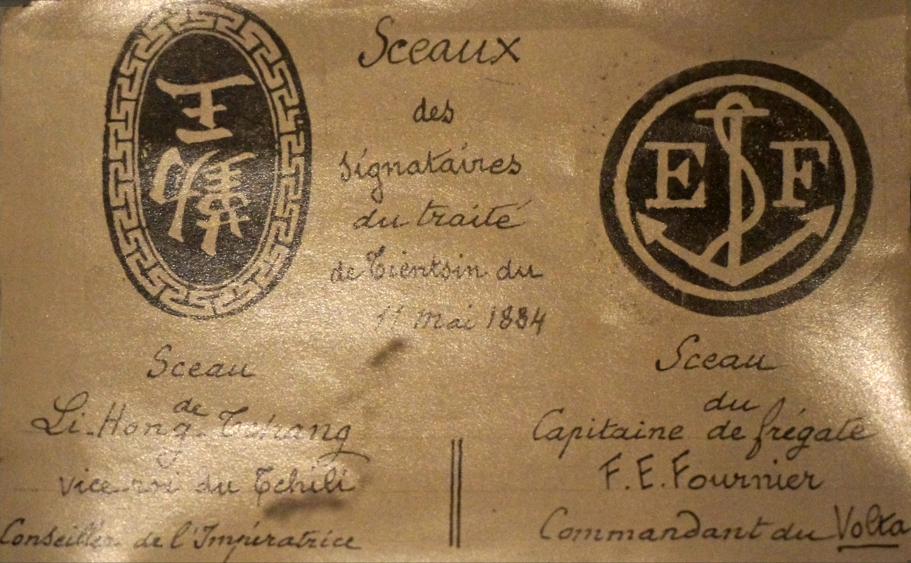 Présenté lors de l'exposition Indochine des territoires et des hommes 1856 1956 .